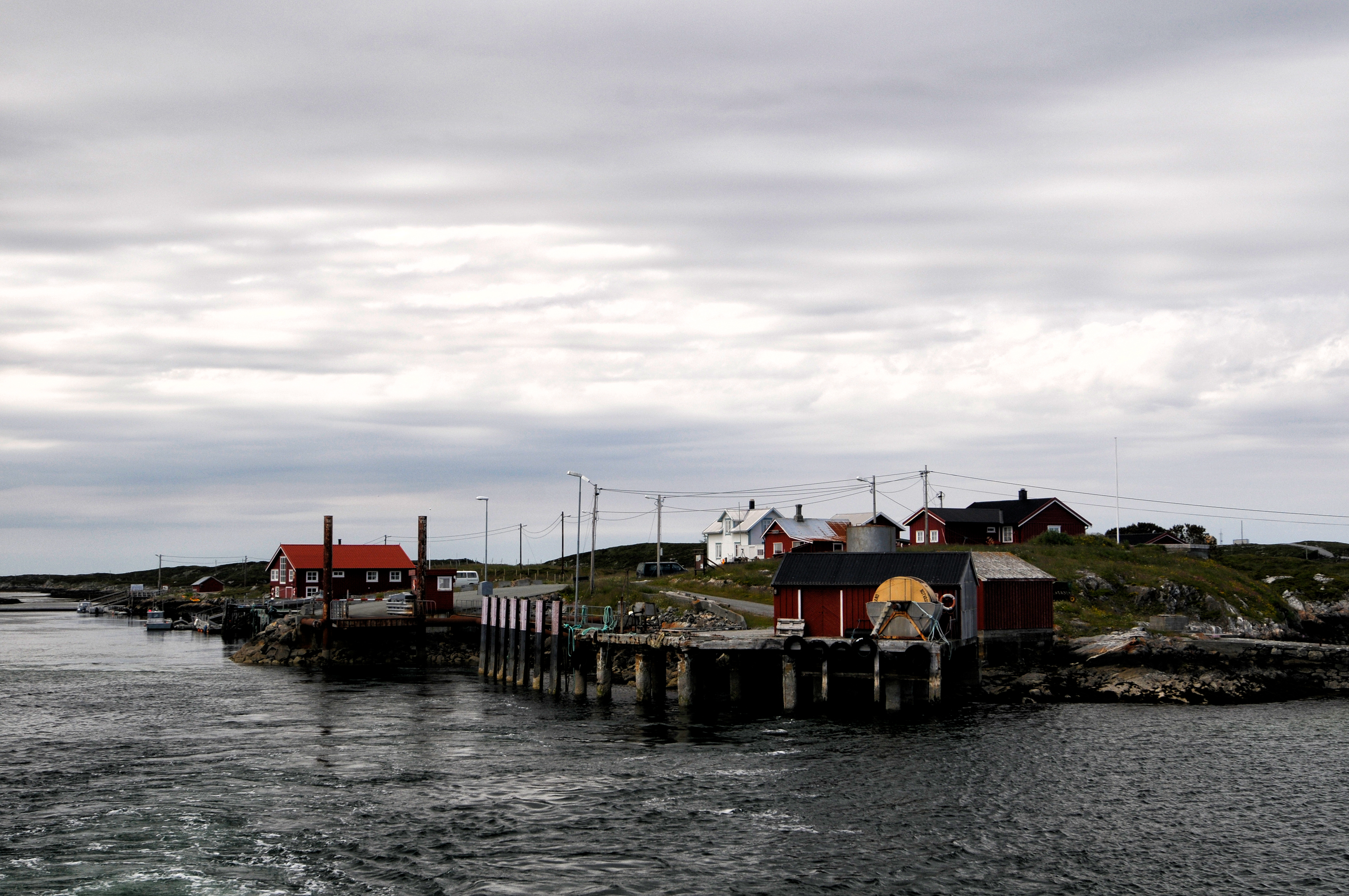 Fergeleiet på Husøya